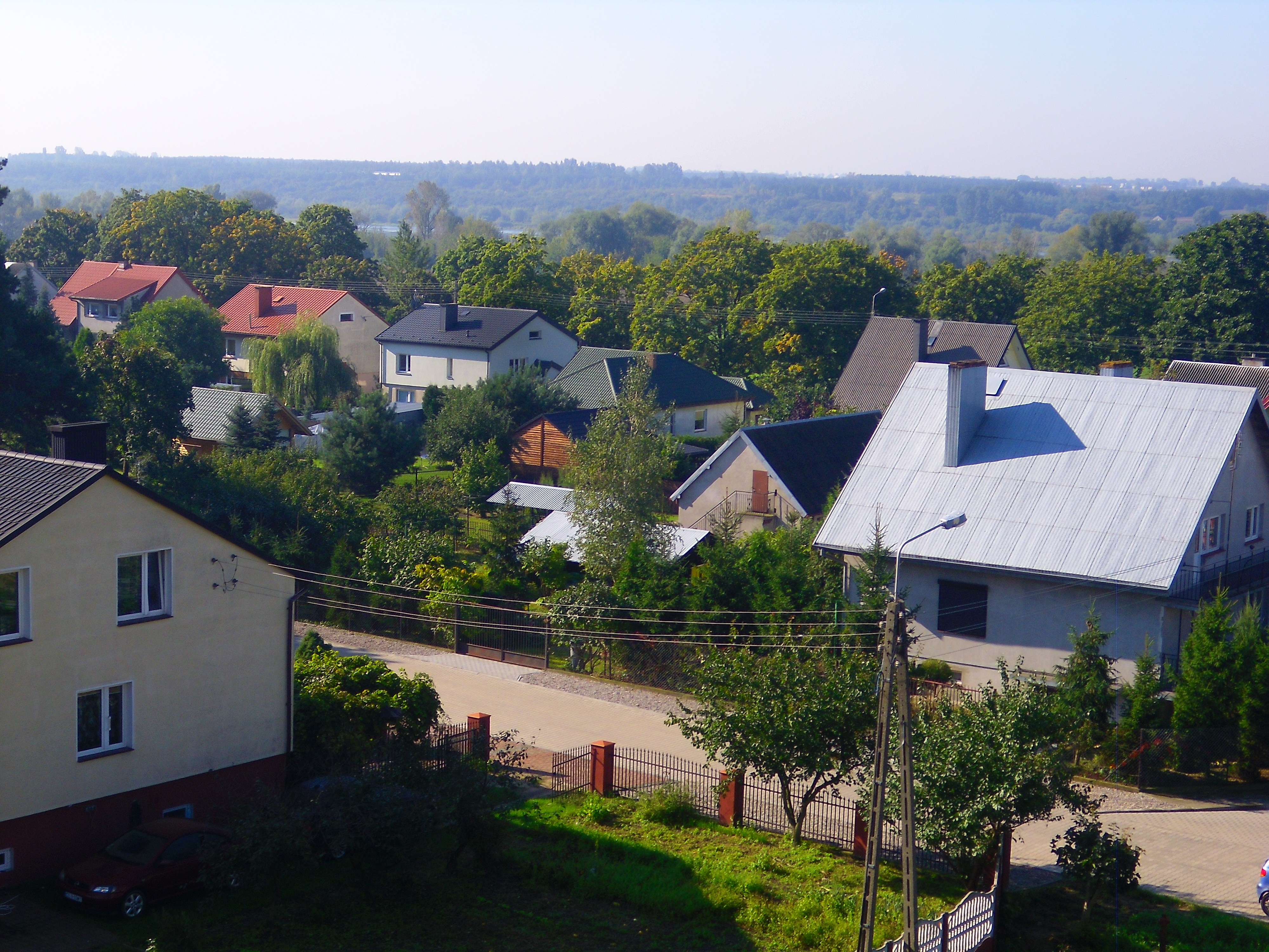 Widok ulicy Basztowej w Bobrownikach